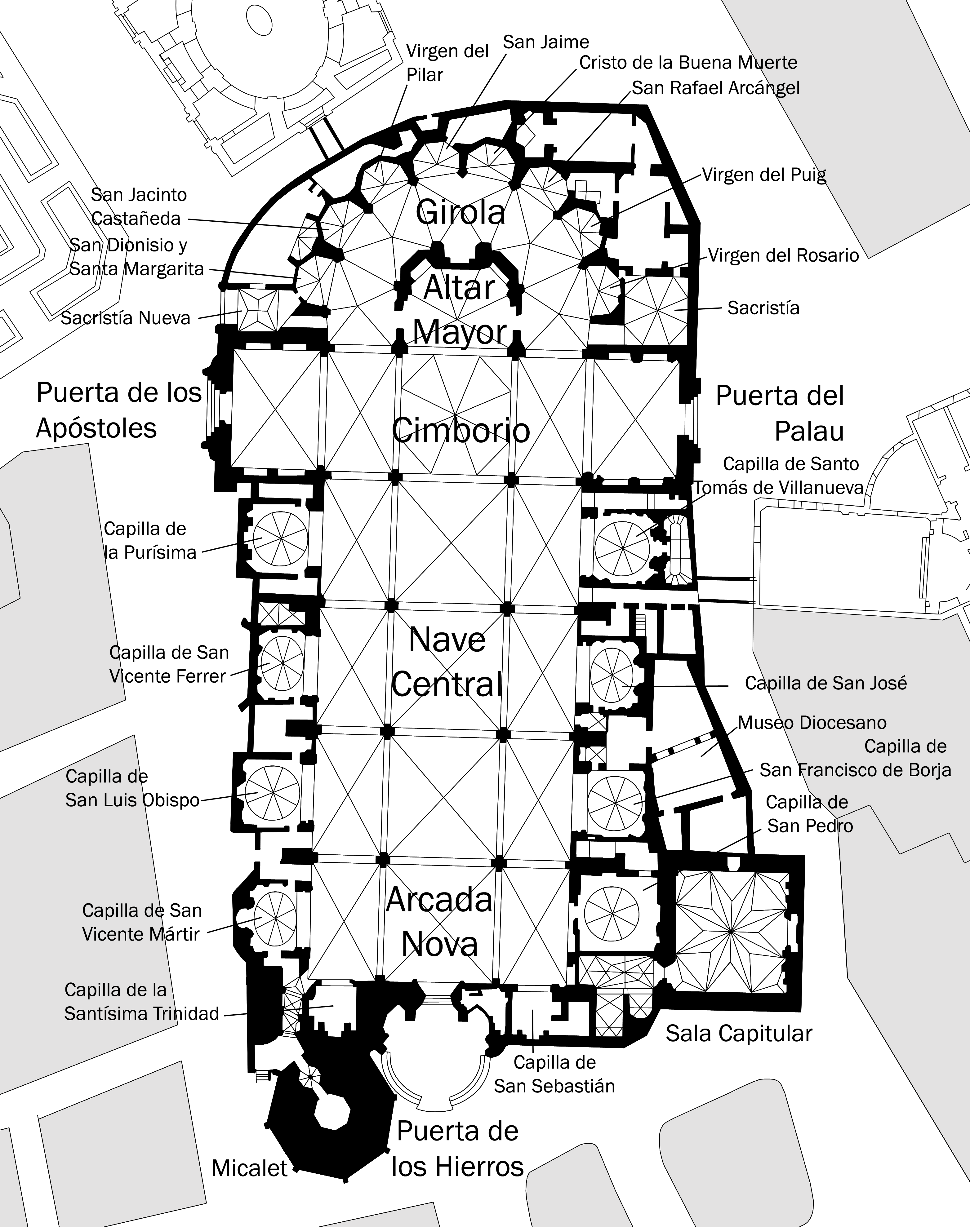 Plano de la Catedral de Valencia indicando sus principales elementos. Valencia, Comunidad valenciana, España.